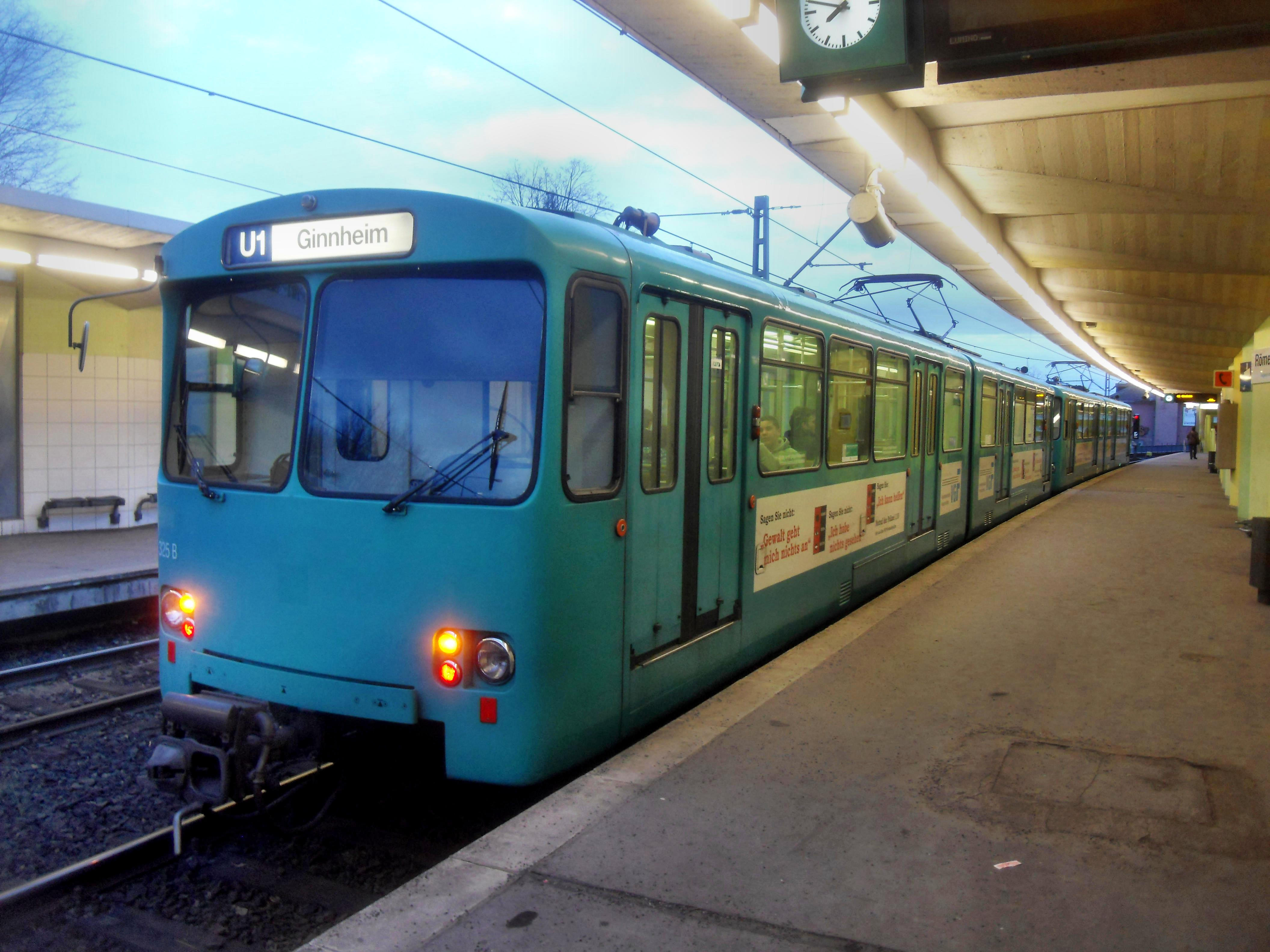 U 2h-Triebwagen 325 B der U-Bahn Frankfurt im U-Bahnhof Römerstadt auf der Linie U 1 auf dem Weg nach Frankfurt-Ginnheim in Hessen (Deutschland)